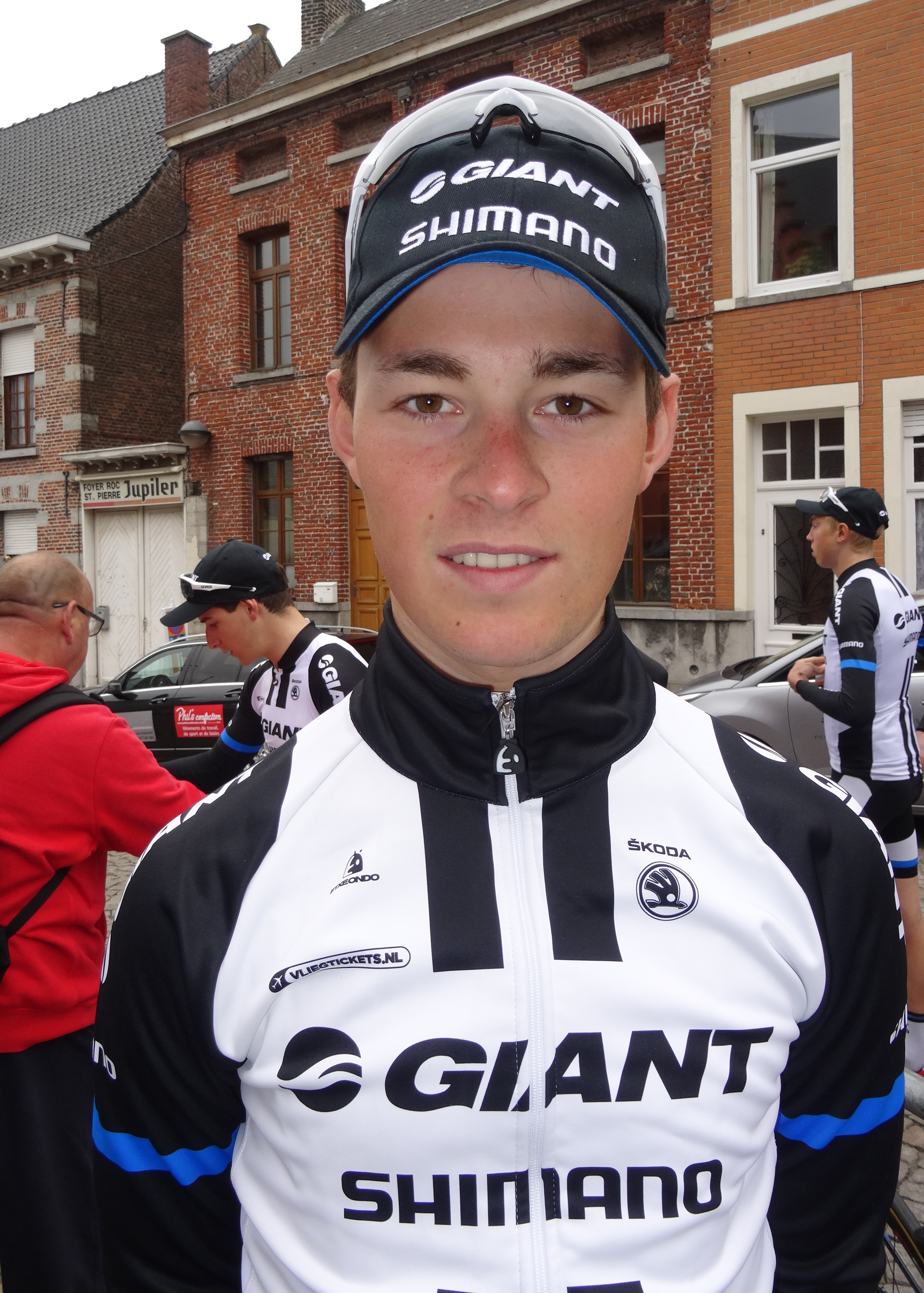 Triptyque des Monts et Châteaux 2014, étape 1, 4 avril 2014, départ d'Antoing. Depicted person: Jan Brockhoff Depicted team: Giant-Shimano Development The creation of these files was made possible thanks to the organizers of the Triptyque des Monts et Châteaux 2014 English | français | +/−